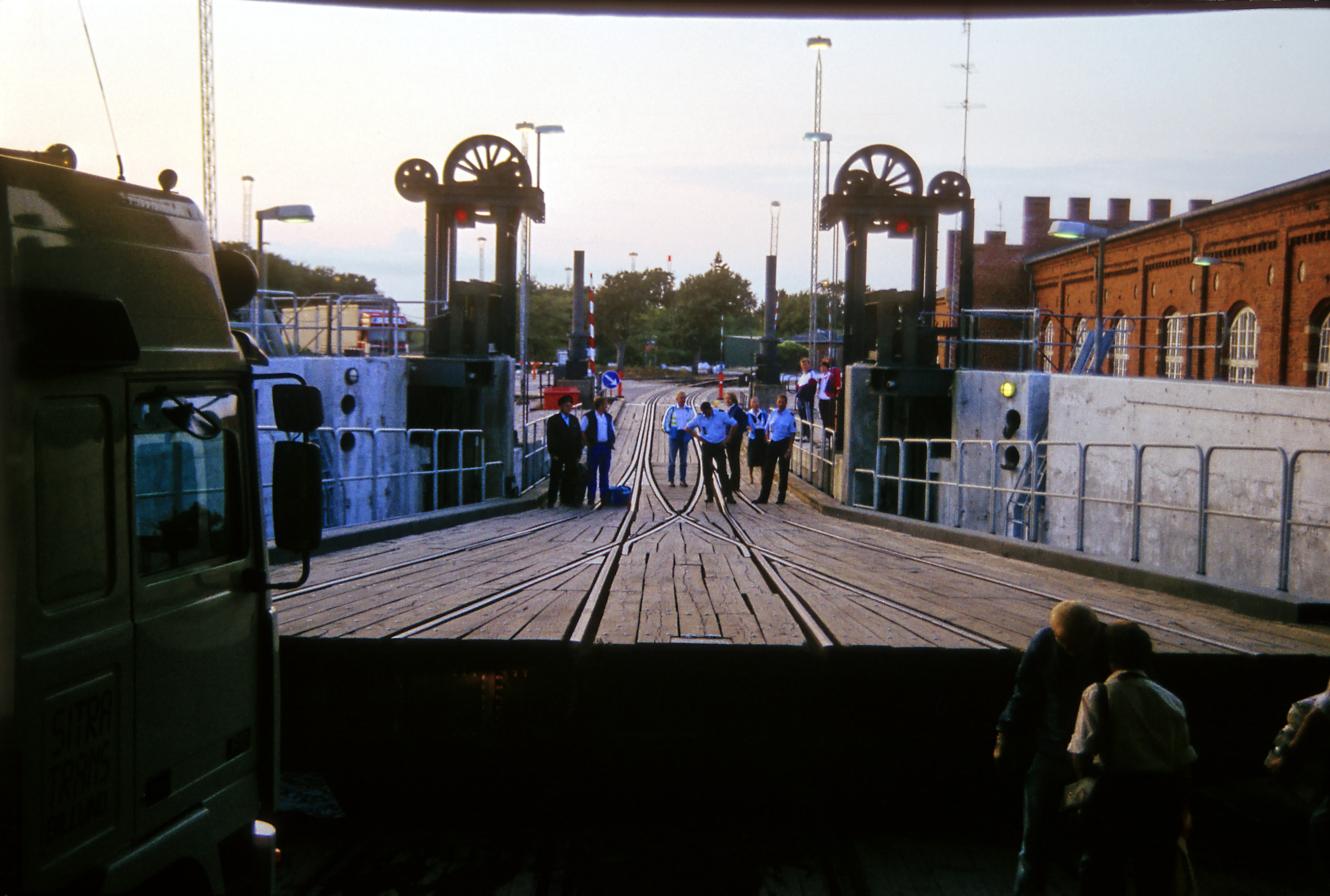 Erst zwei Jahre vorher wurde die Fährbrücke auf Festmachen über Heck umgebaut. Der Aufwand dürfte sich nicht mehr gelohnt haben, Ende September 1995 wurde der Eisenbahnfährbetrieb zwischen Warnemünde und Gedser eingestellt.